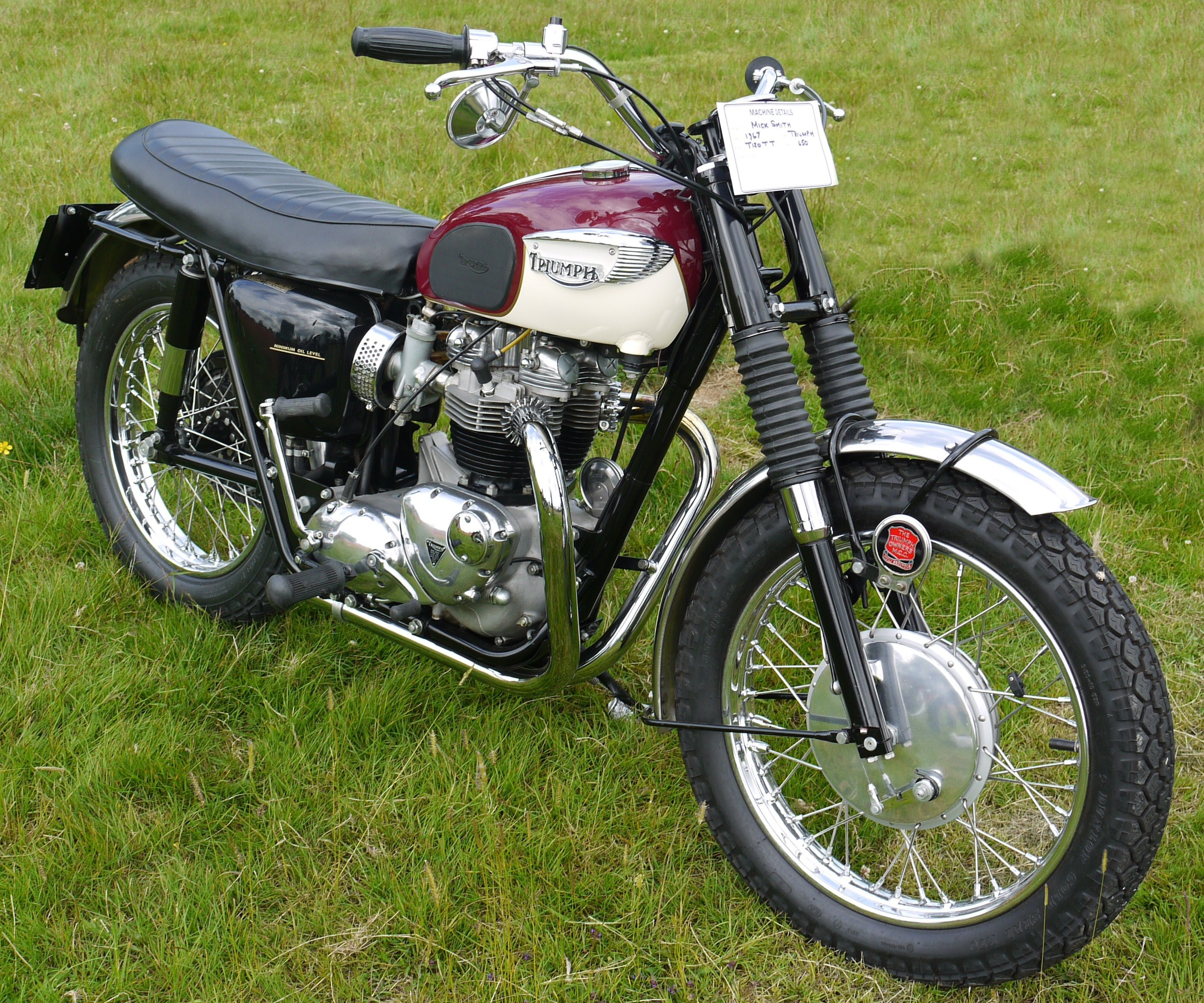 Panasonic G1 14-45 Lens